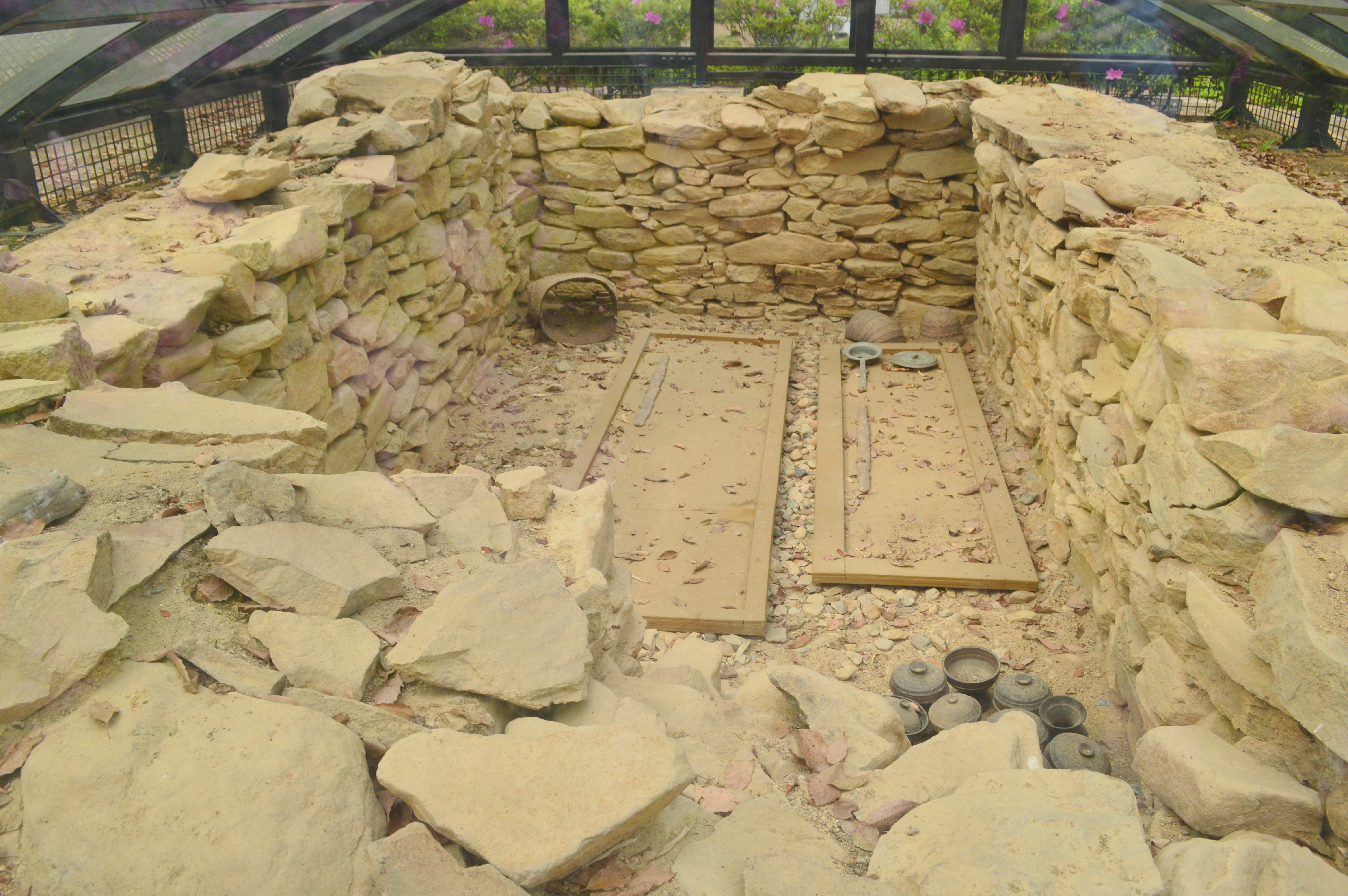 高井田山古墳 石室内部